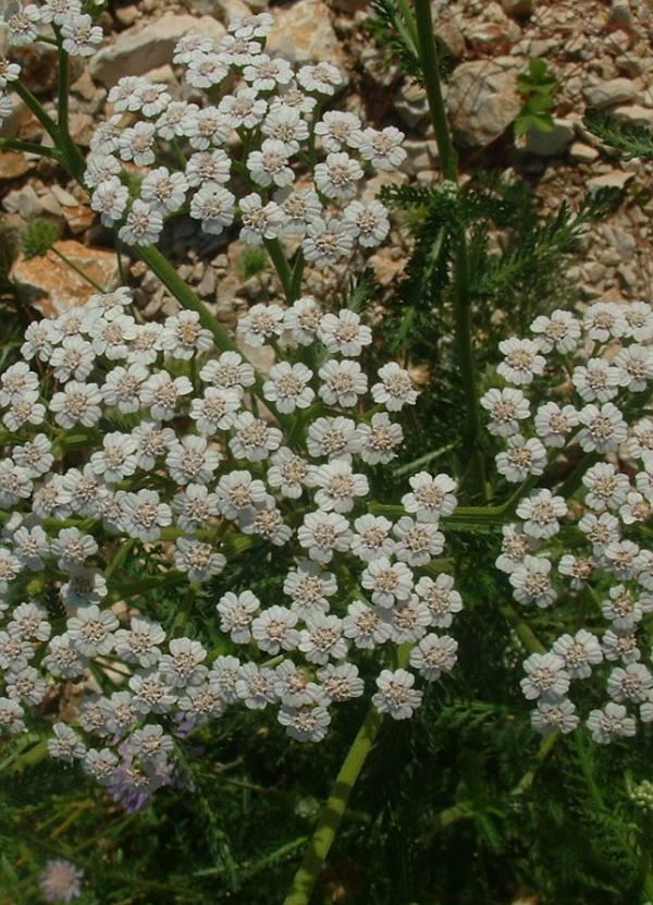 Achillée mille-feuilles, photo J.F. Gaffard, Bucey-les-Gy, août 2004